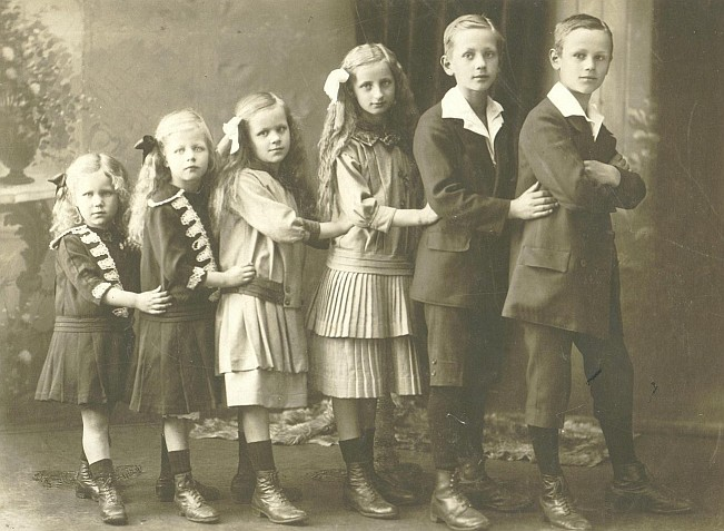 Die Dreisbach-Kinder zur Zeit des 1. Weltkriegs